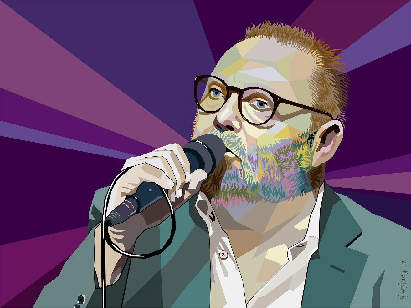 digital image created by geoffrey wren